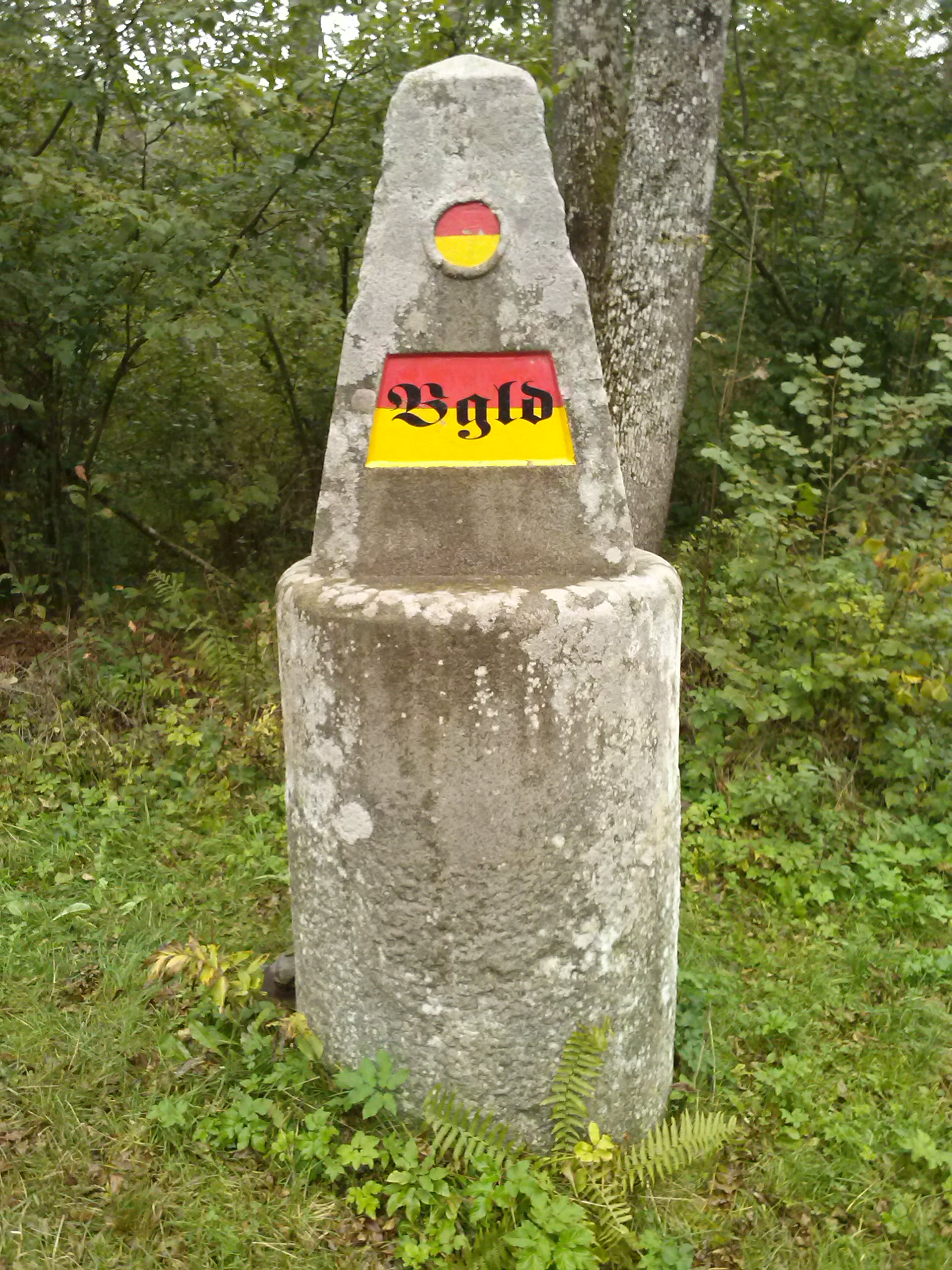 Dreiländerecke Burgenland, Steiermark und Niederösterreich: Grenzstein - Seite Burgenland